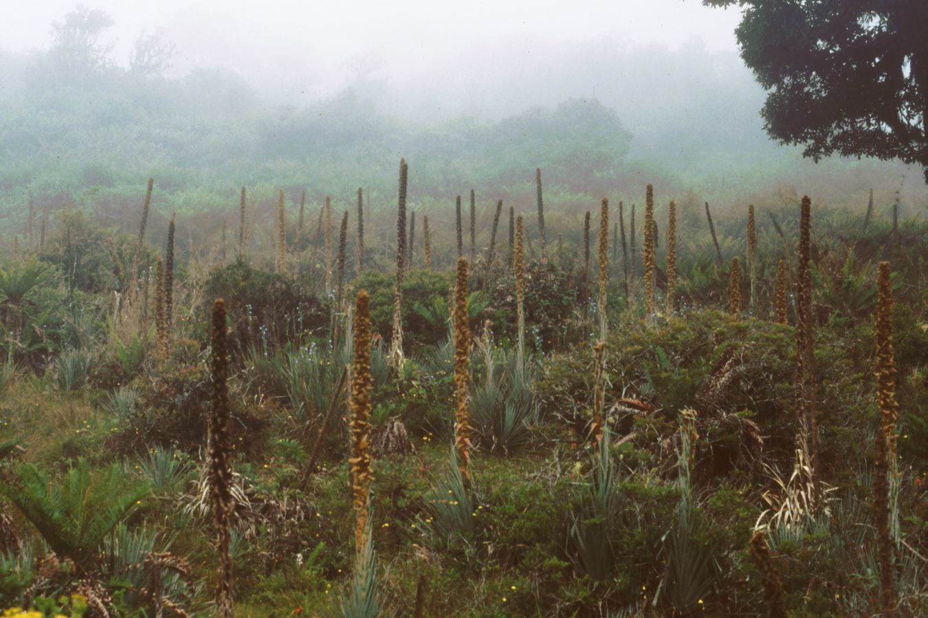 Puya dasylirioides, Bromeliaceae – Costa Rica: Prov. Cartago, Cordillera de Talamanca, Carretera Interamericana, Madre Selva.